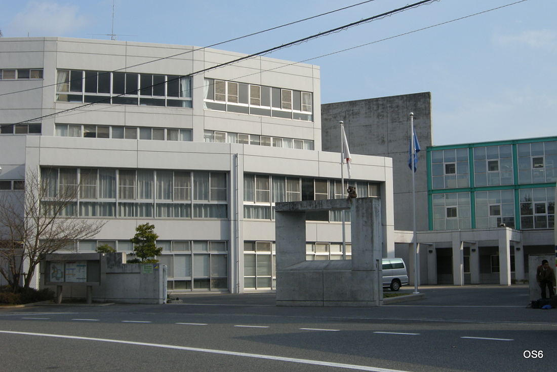 如水館中学・高等学校 Josuikan school